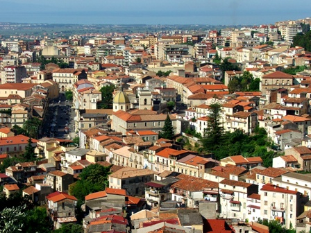 Scorcio di Lamezia dalla Collina del Soccorso. Autore: Francesco Cataudo